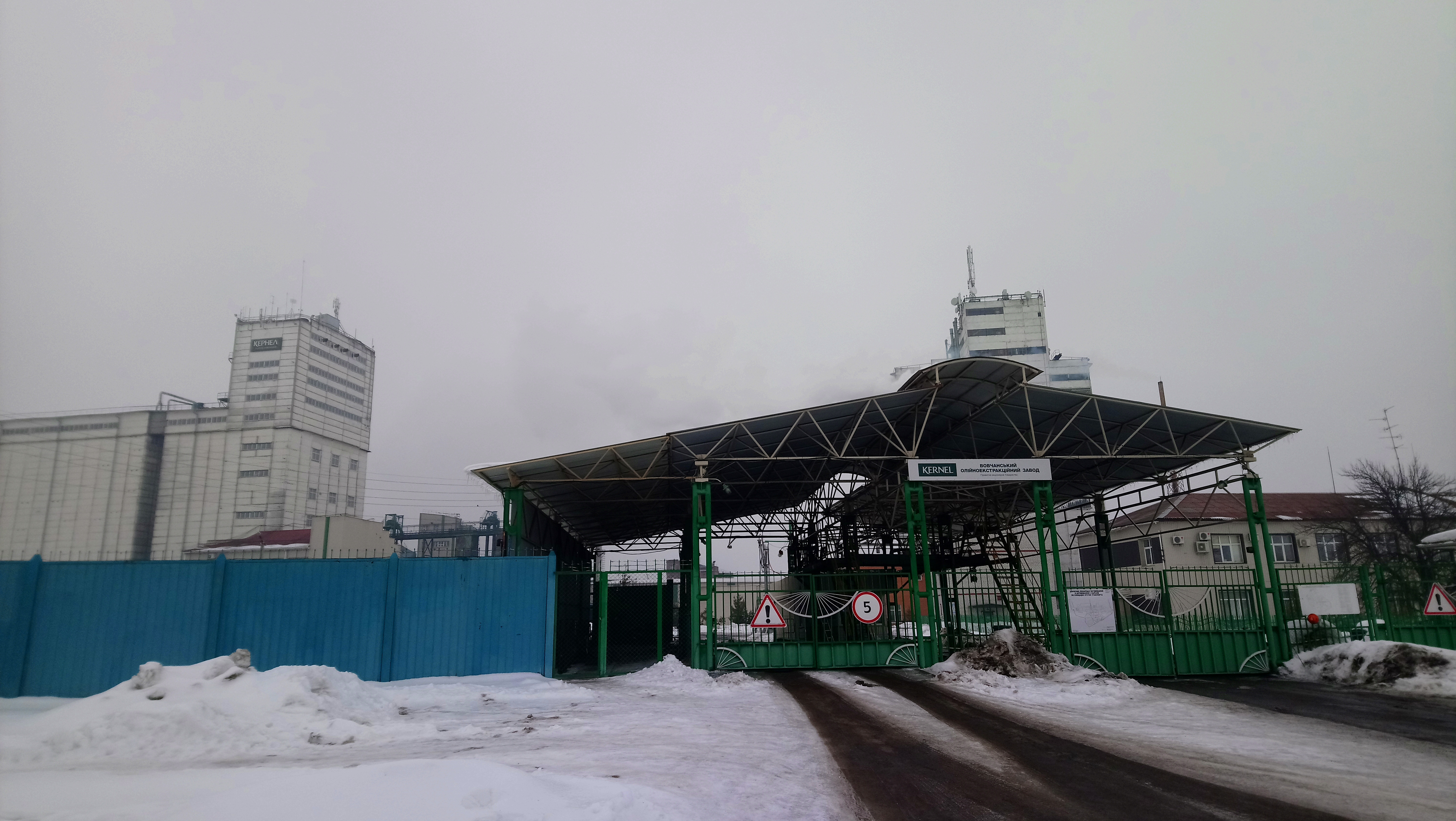 Вовчанський олійноекстракційний завод (належить до "Кернел груп") головний в'їзд на підприємство.